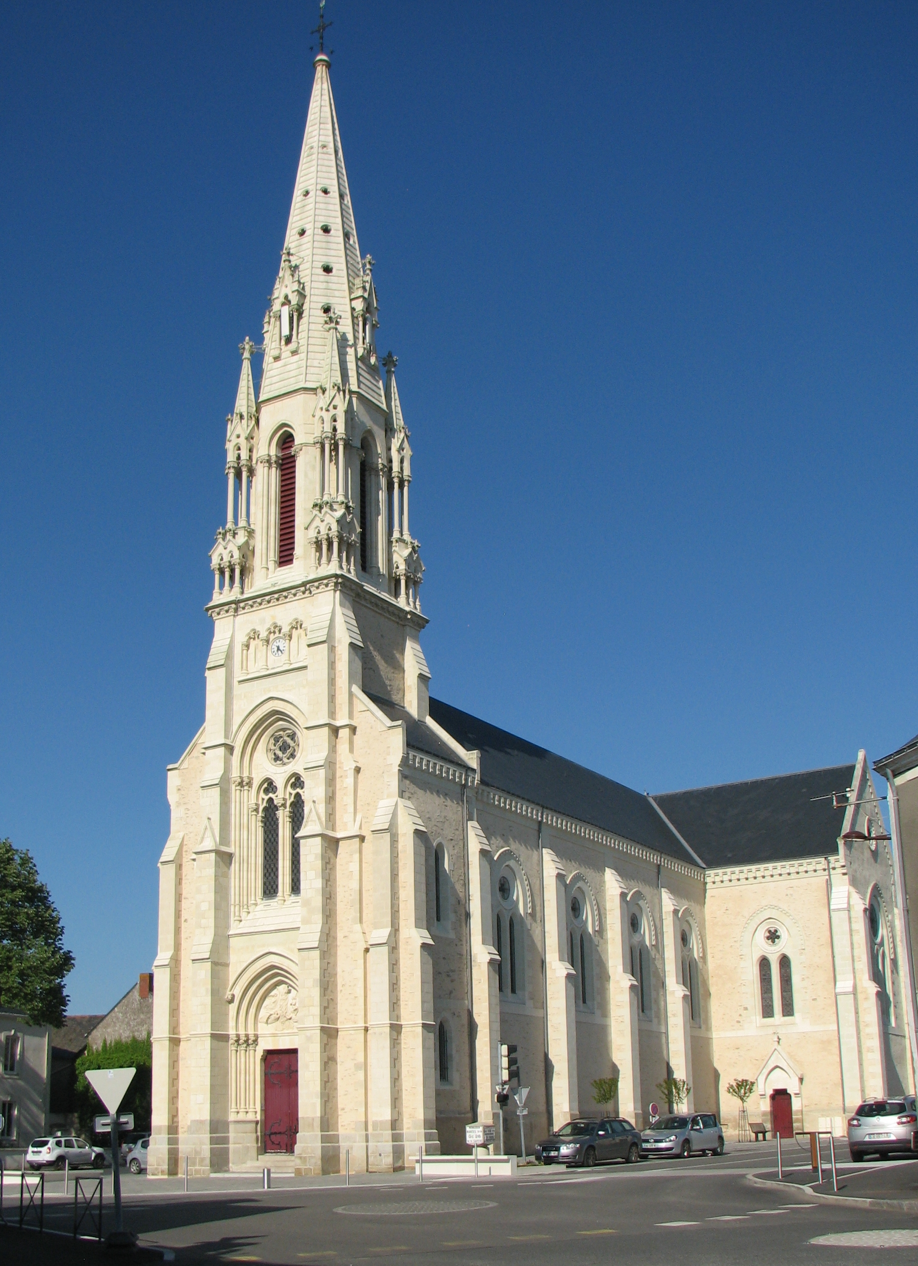 Eglise de Grandchamps des Fontaines (Loire-Atlantique) après ravalement.